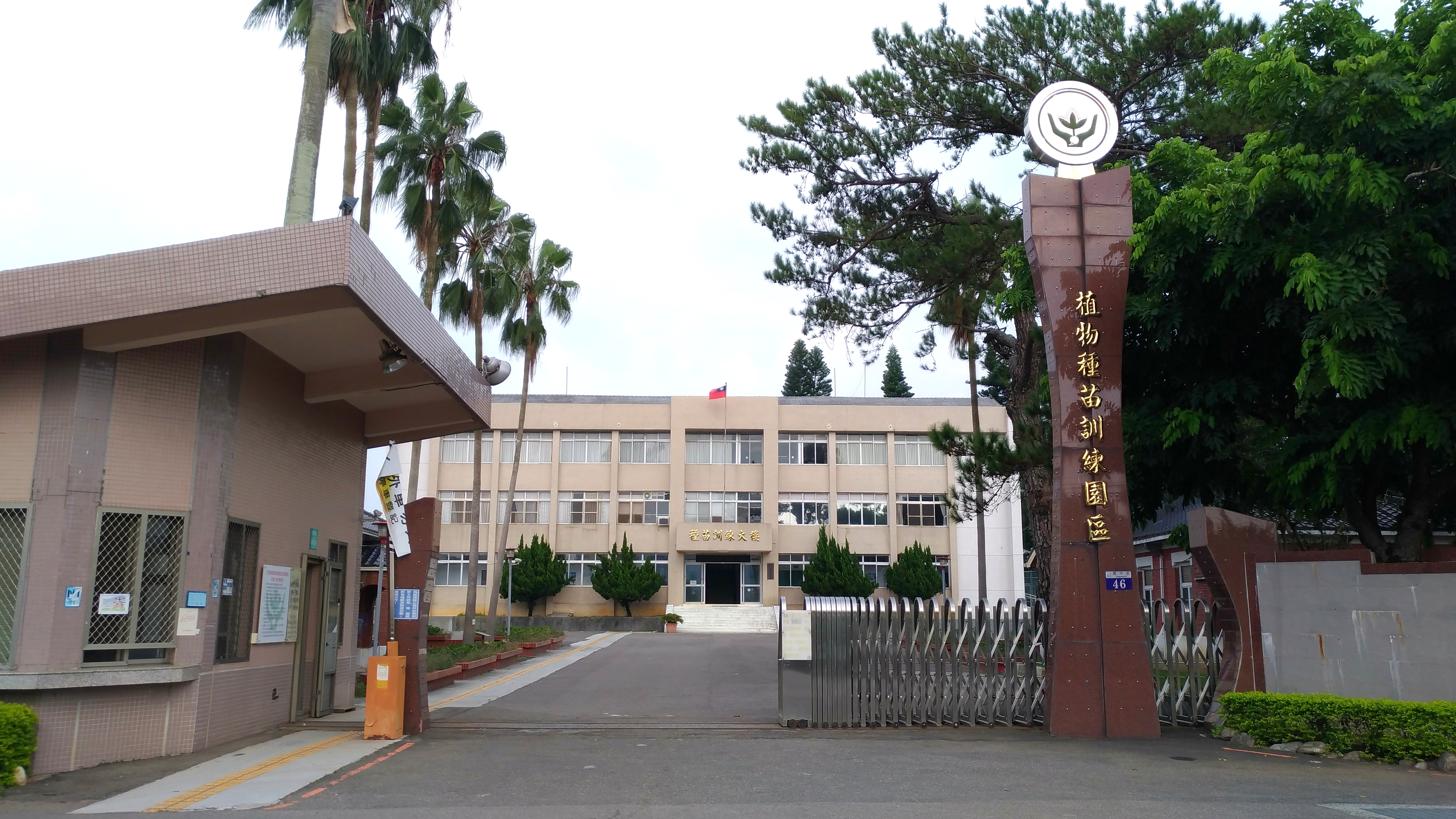 行政院農委會種苗改良場植物種苗訓練園區